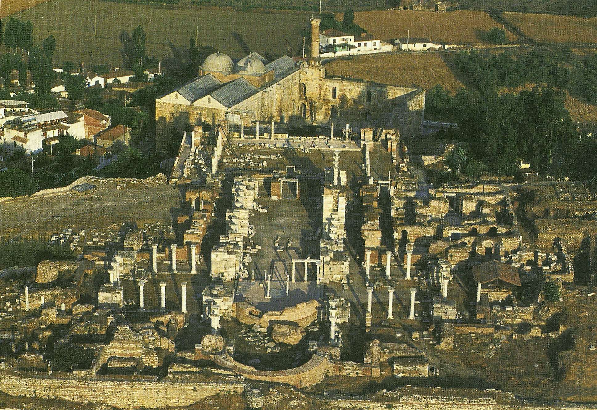 Basílica de San Juan, Éfeso